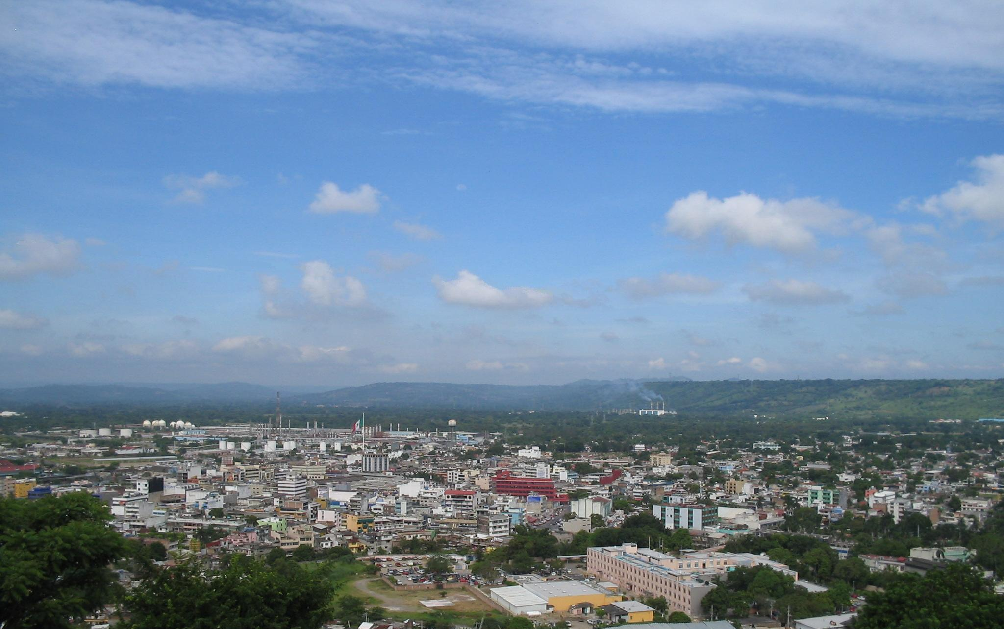 Vista del Centro Urbano de la Ciudad de Poza Rica de Hidalgo, Veracruz. Fotografía tomada desde el sitio denominado Cerro del Abuelo.